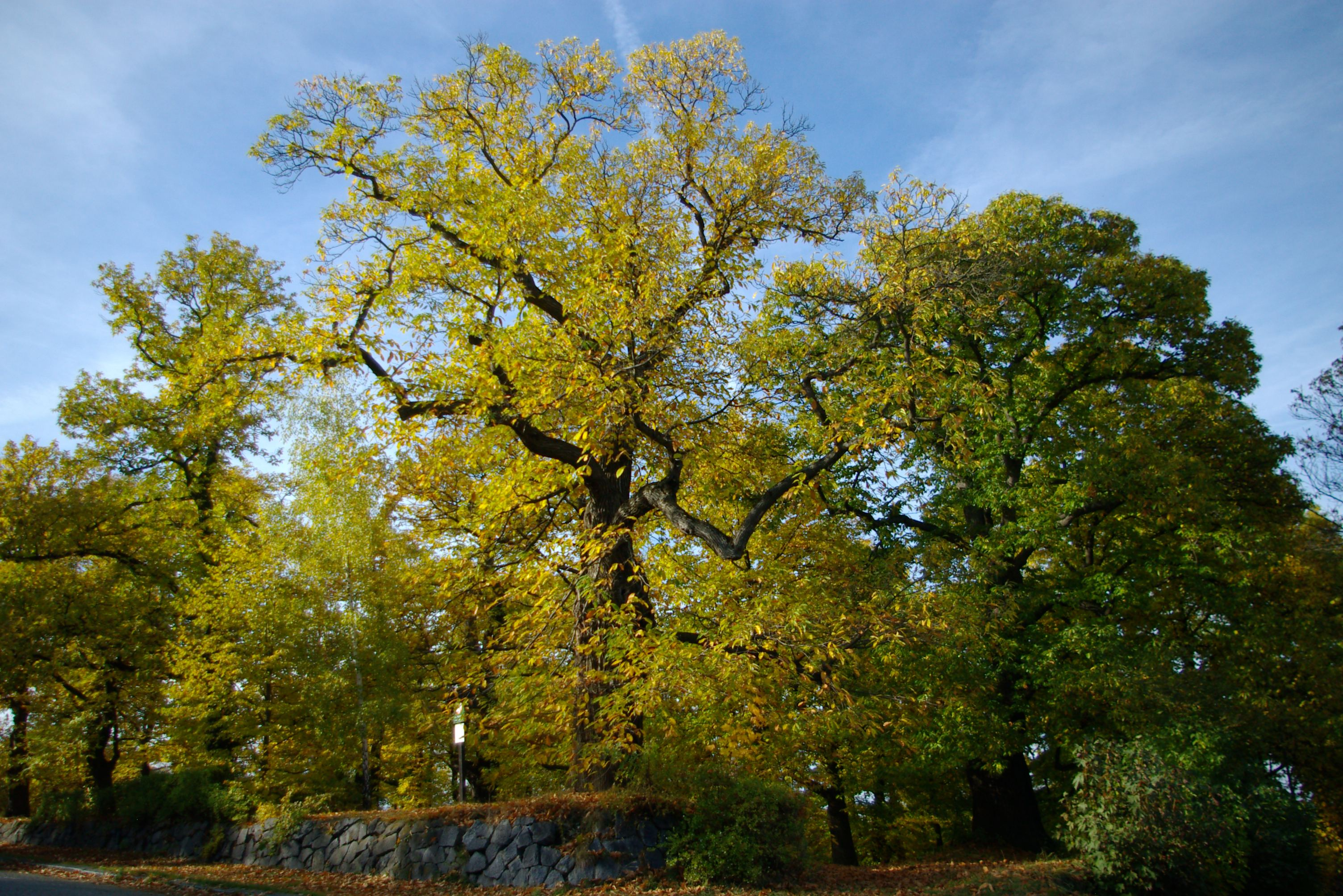 Vstudo do kaštanky z ulice